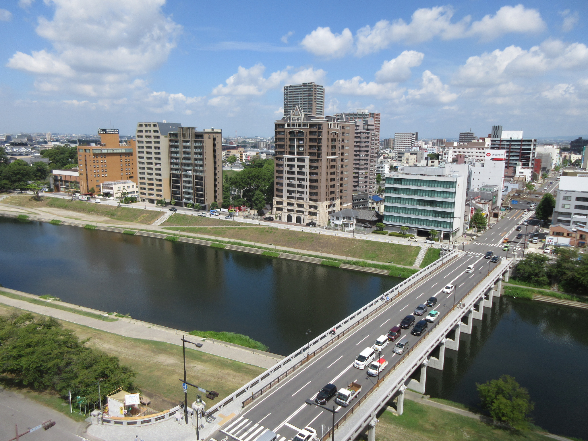 乙川に架かる殿橋（愛知県岡崎市）